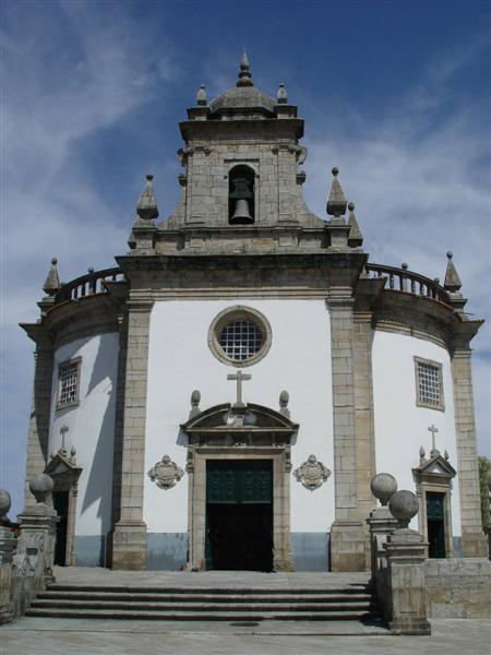 Igreja do Senhor da Cruz em Barcelos, Portugal